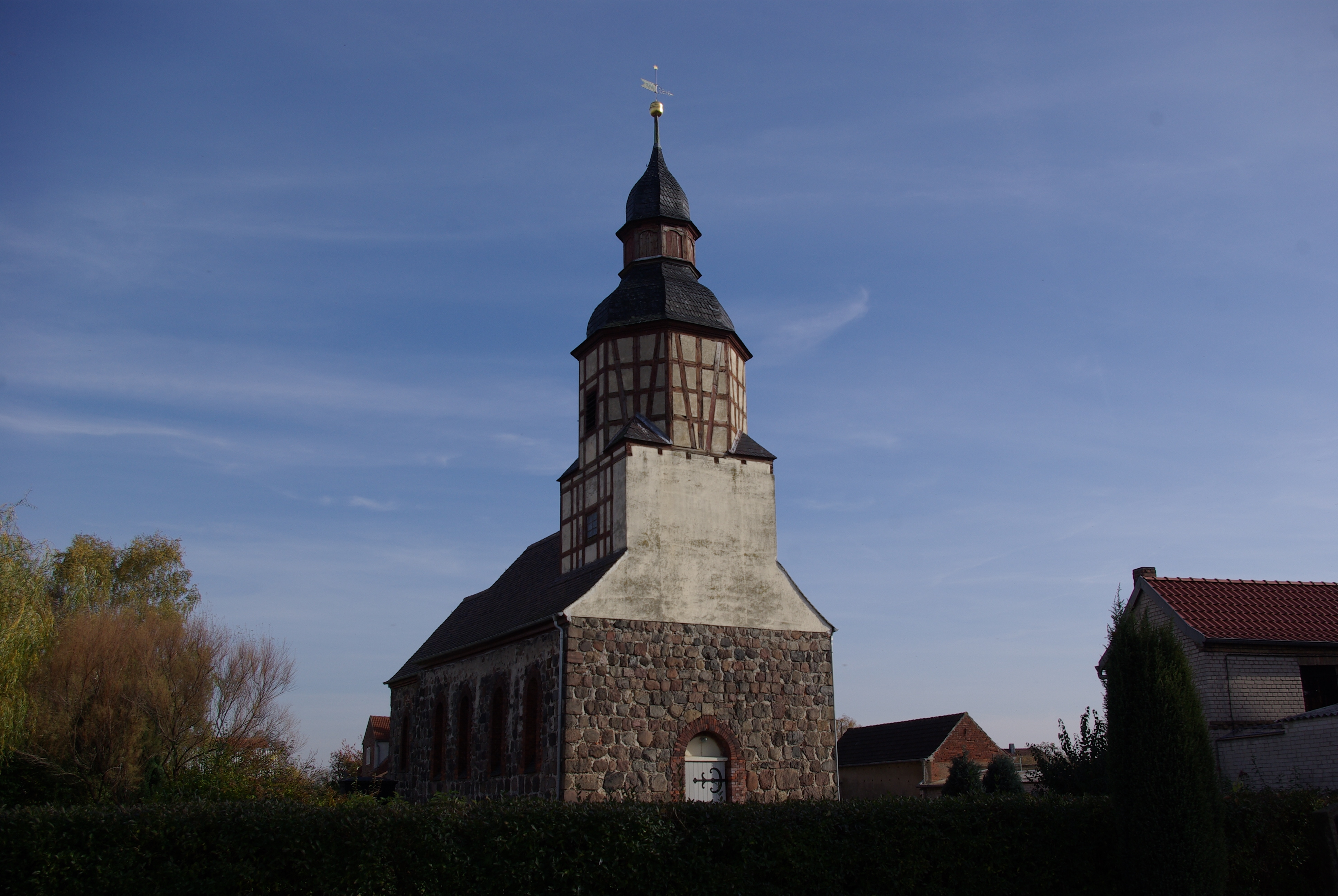 Niedergörsdorf in Brandenburg. Die Kirche wurde in der zweiten Hälfte des 13. Jahrhundert erbaut, die Kirche steht unter Denkmalschutz.